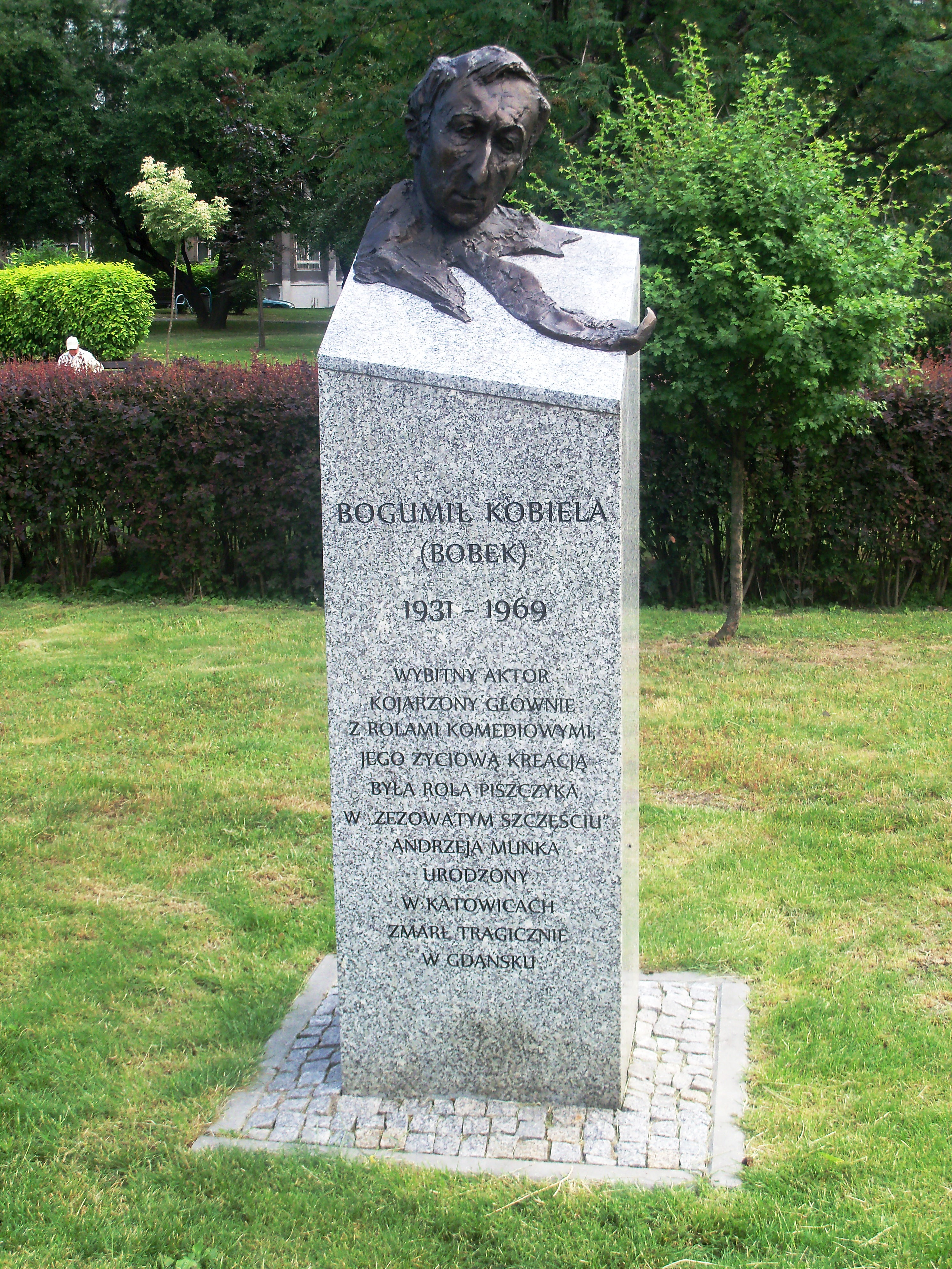 Galeria Artystyczna na placu Grunwaldzkim w Katowicach: Rzeźba przedstawiająca Bogumiła Kobielę